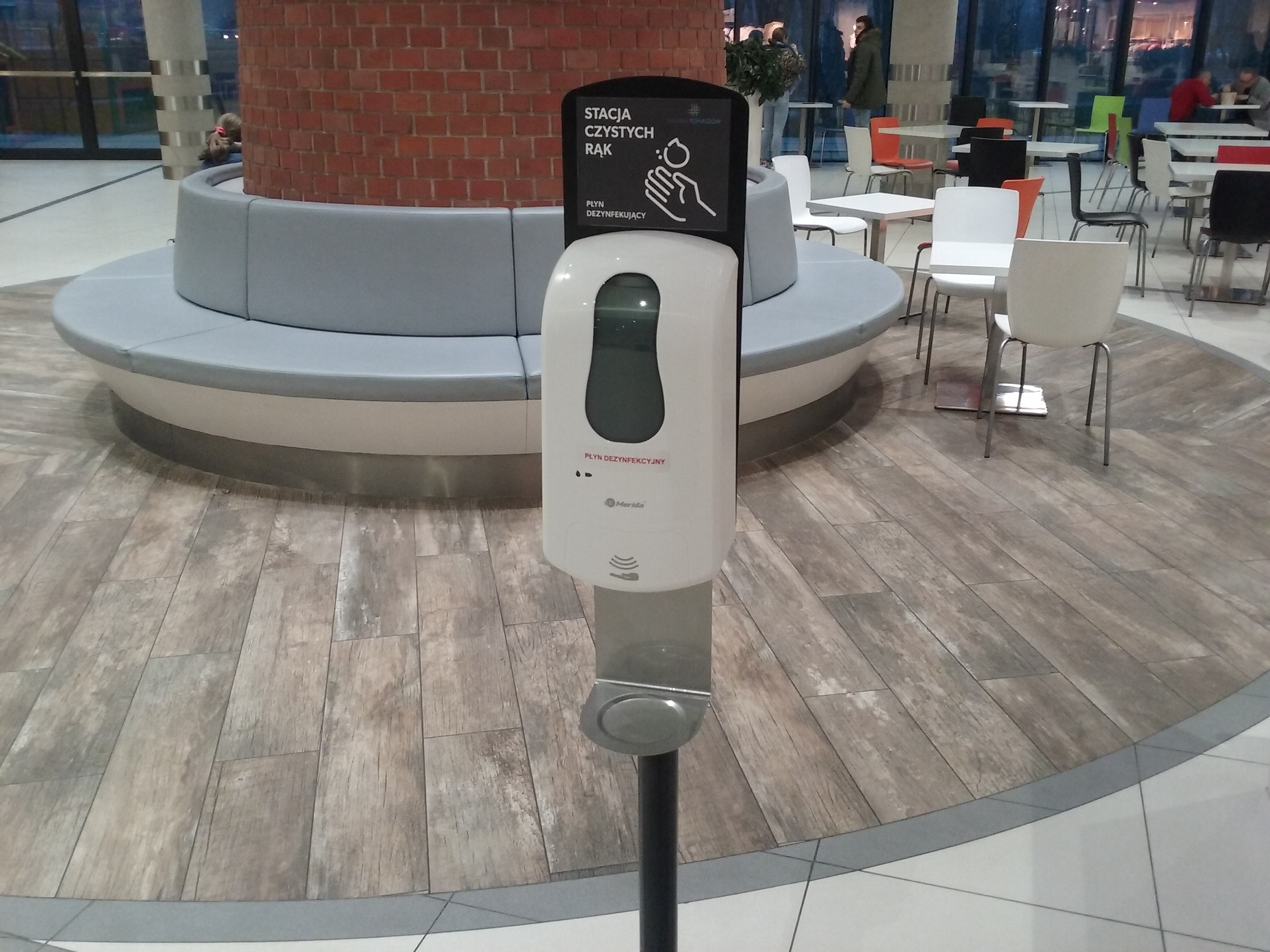 Ogólnodostępny automatyczny odkażacz do rąk w czasie zagrożenia pandemią koronawirusem COVID-19 w galerii handlowej w Tomaszowie Mazowieckim EN. Hand sanitizer in Tomaszów Mazowiecki, central Poland